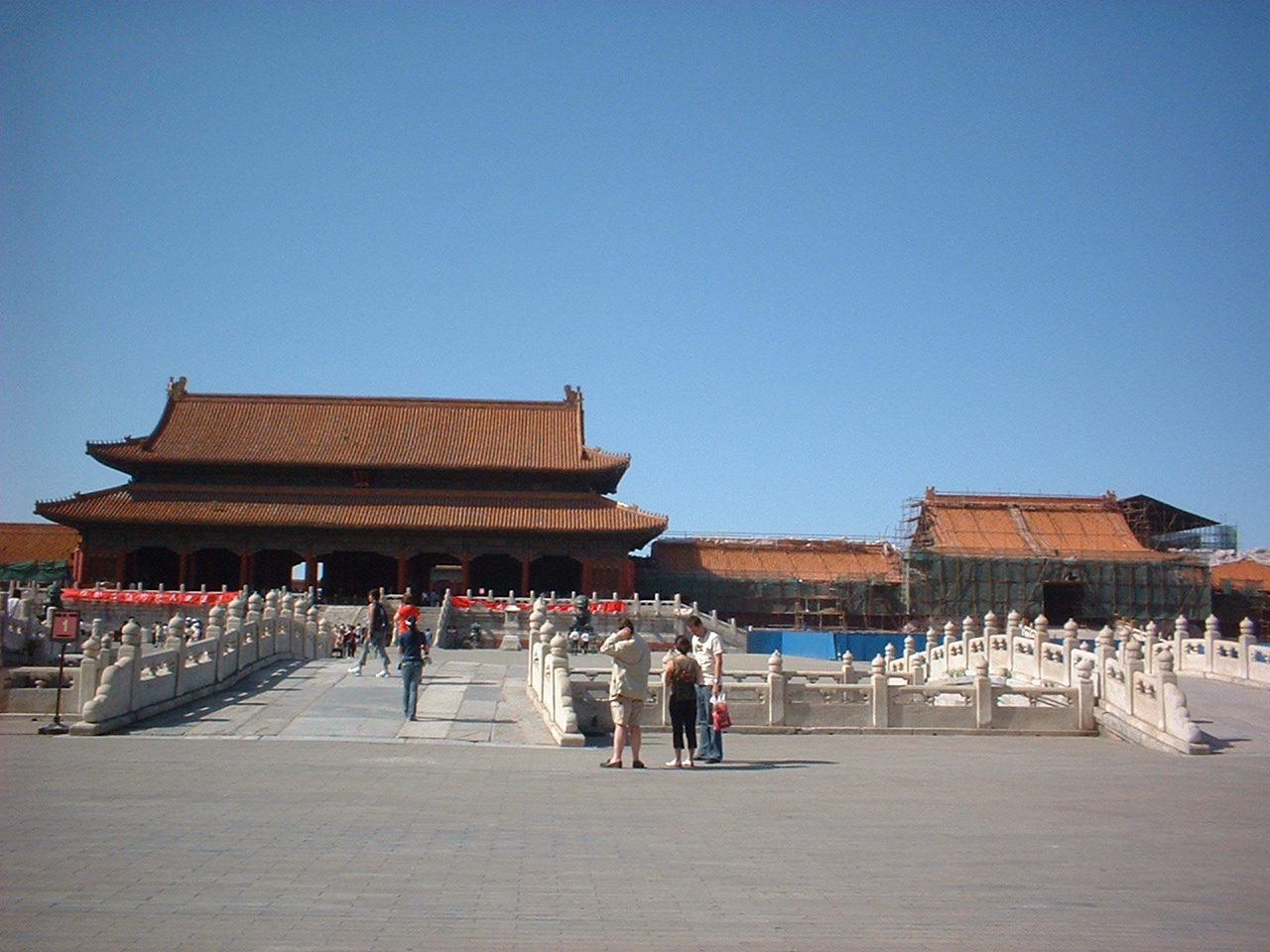 Zakázané město v čínském Pekingu